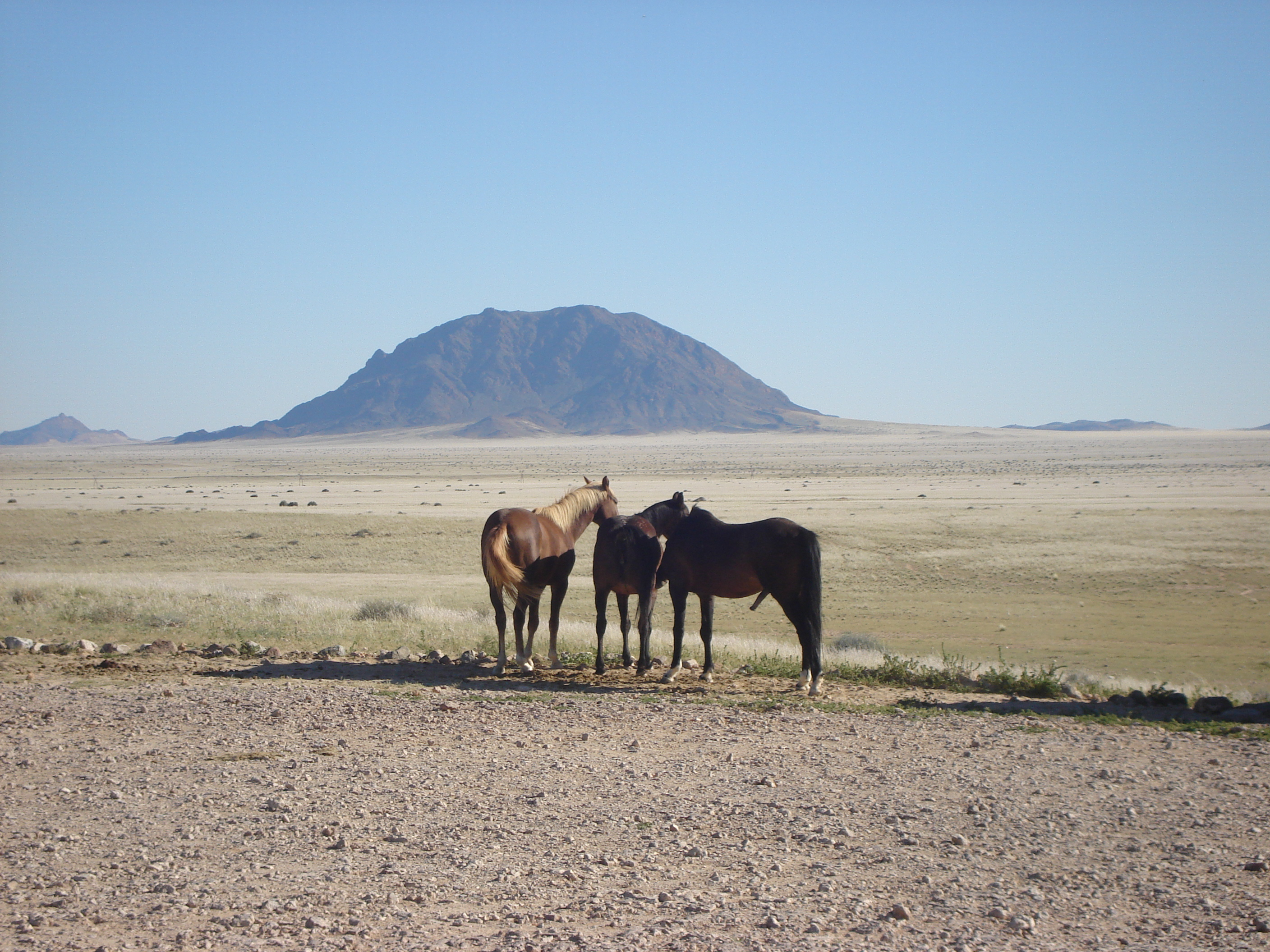 Dikwillem (Namibia) mit den Wildpferden von Garub